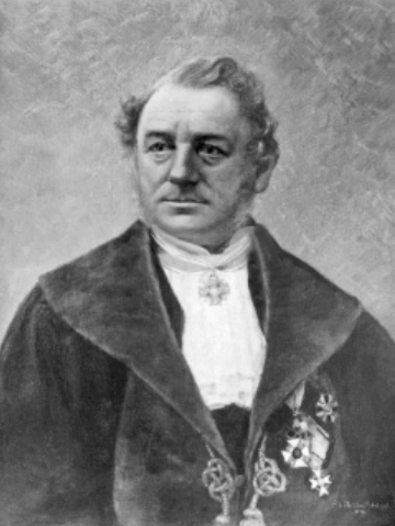 Hubert von Luschka (* 27. Juli 1820 in Konstanz; † 1. März 1875 in Tübingen), Tübinger Professor, Gemälde von M. Müller-Schüppel 1896